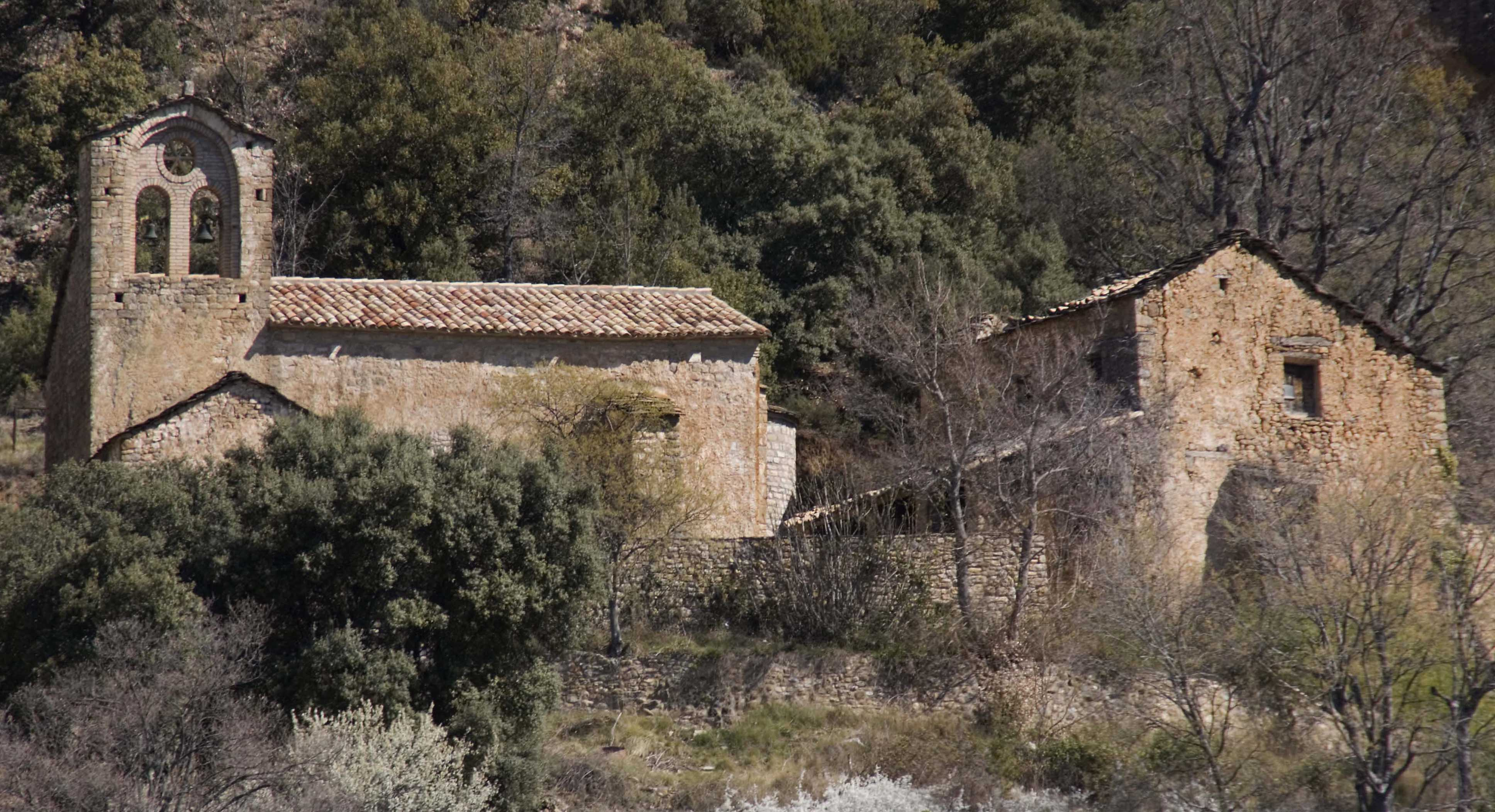 Ermita consagrada per primera vegada en 1.018, d'una sola nau. En La Vileta -Serra del Cis (Sierra de Sis)- en el municipi d'Isàvena, a la Ribagorça aragonesa